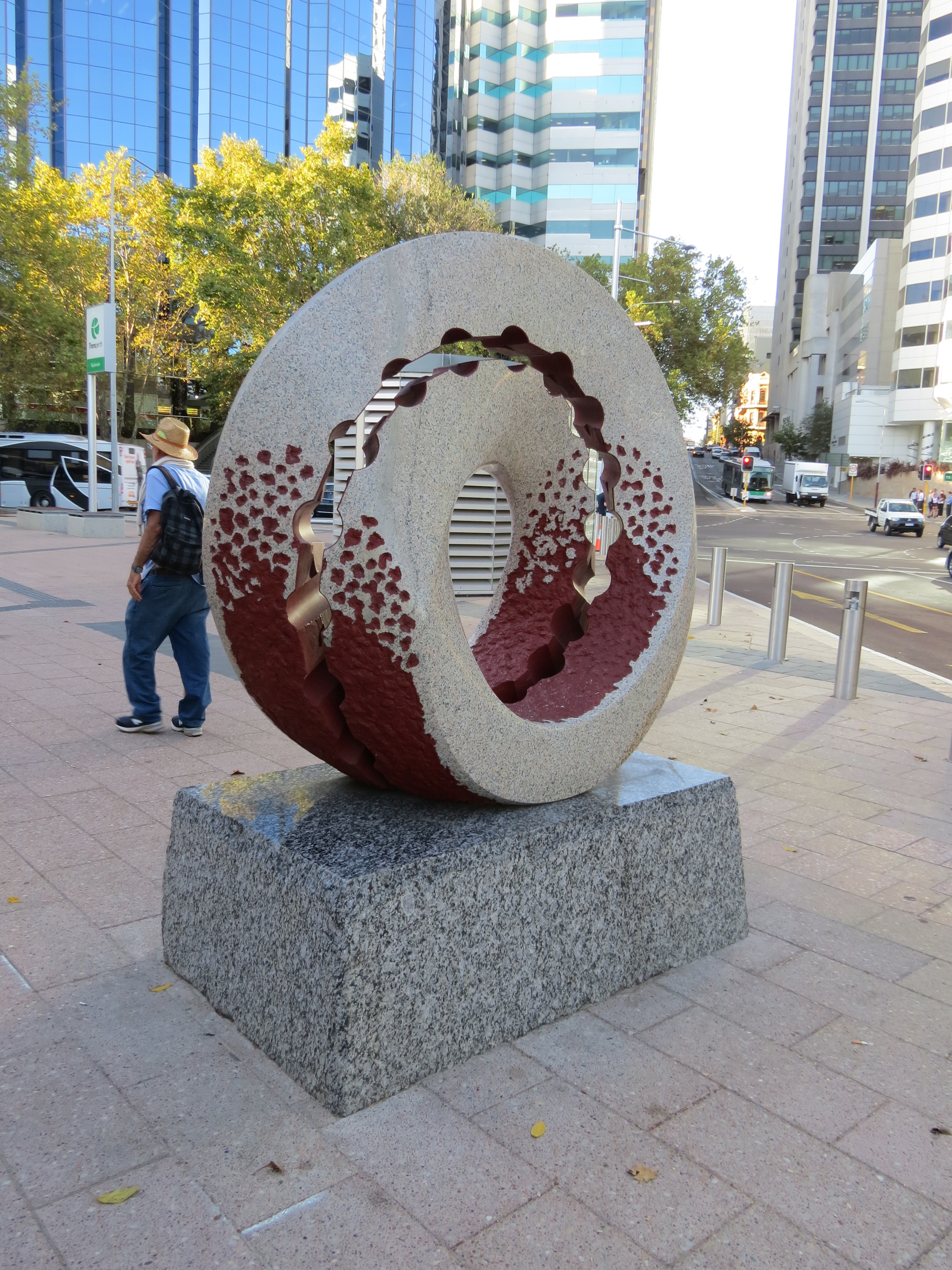 מרכז העיר פרת'